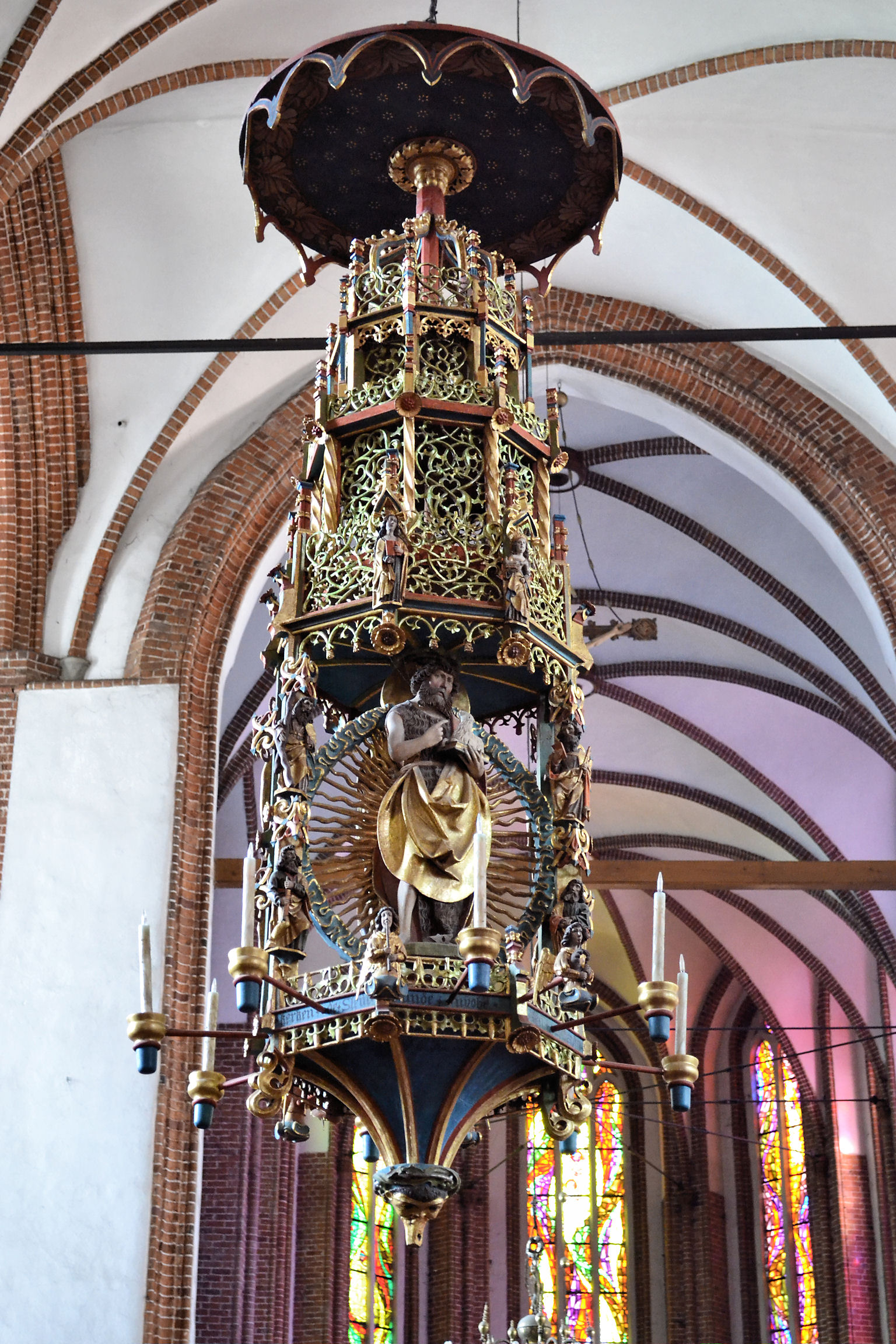 Żyrandol (świecznik) zwany "Koroną Schlieffenów" w katedrze w Kołobrzegu